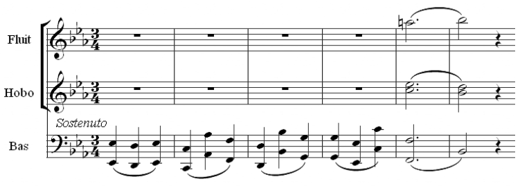 Openingsthema symfonie nr. 103 van J. Haydn